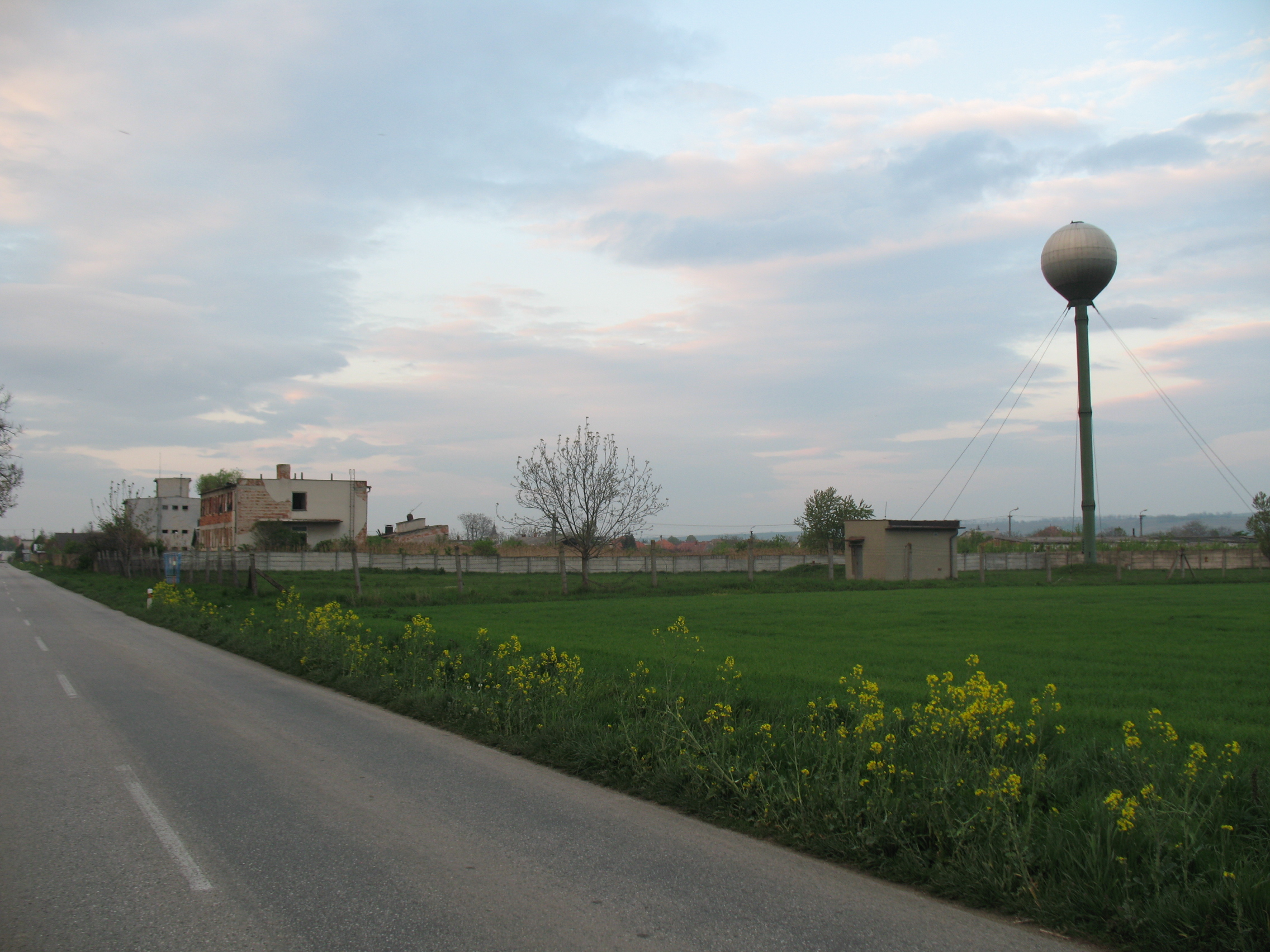 Gyarak